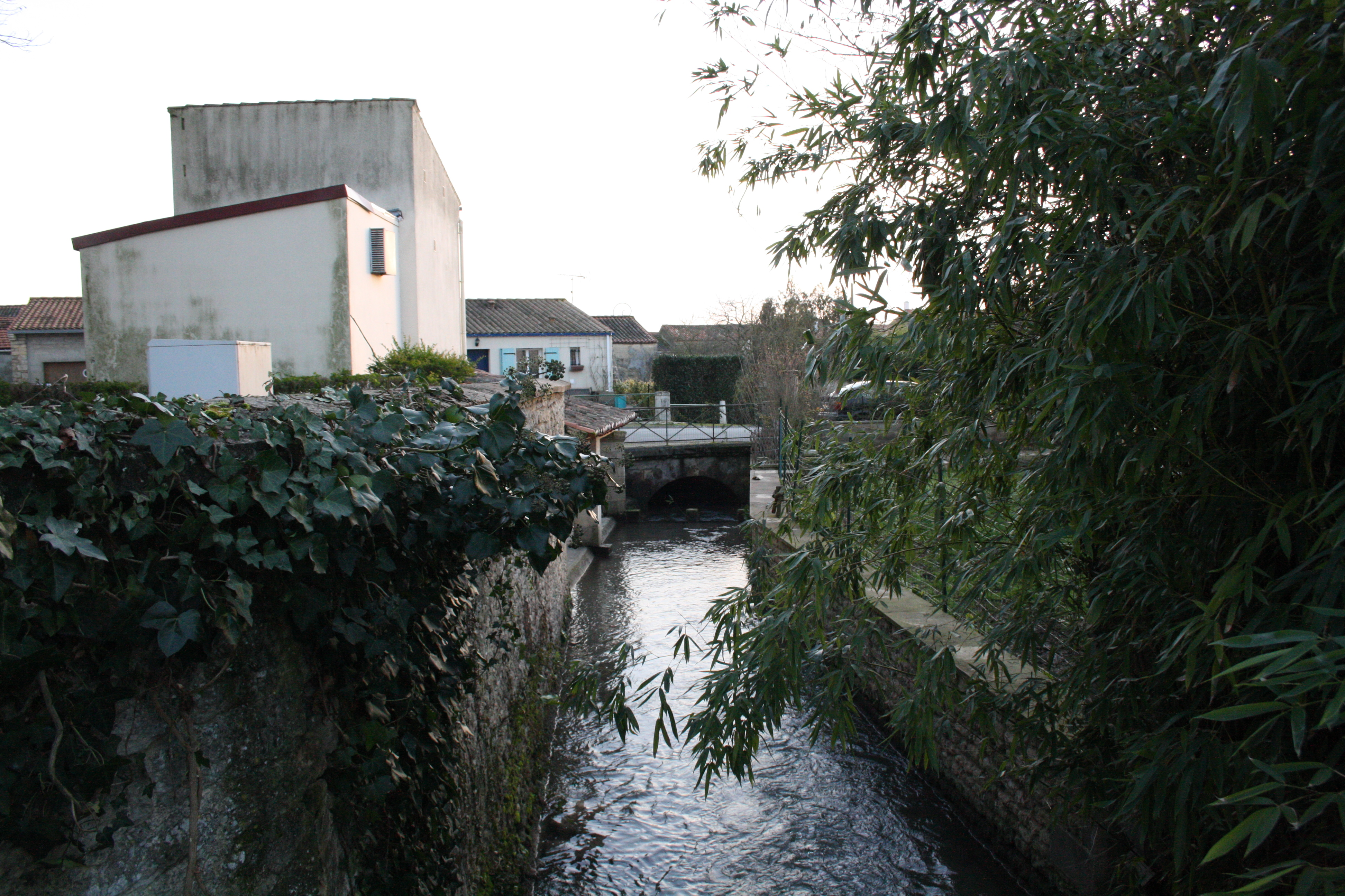 Le Sureau, affluent de la rivière La Trézence, à Bernay, commune de Bernay-Saint-Martin (Charente-Maritime, France).